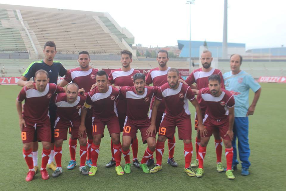 صورة لـ تشكيلة الإتحاد الرياضي لمدينة سطيف